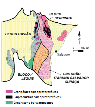 Principais constituintes da porção norte do Cráton do São Francisco: blocos Gavião, Serrinha, Jequié e Cinturção Itabuna-Salvador-Curaçá.